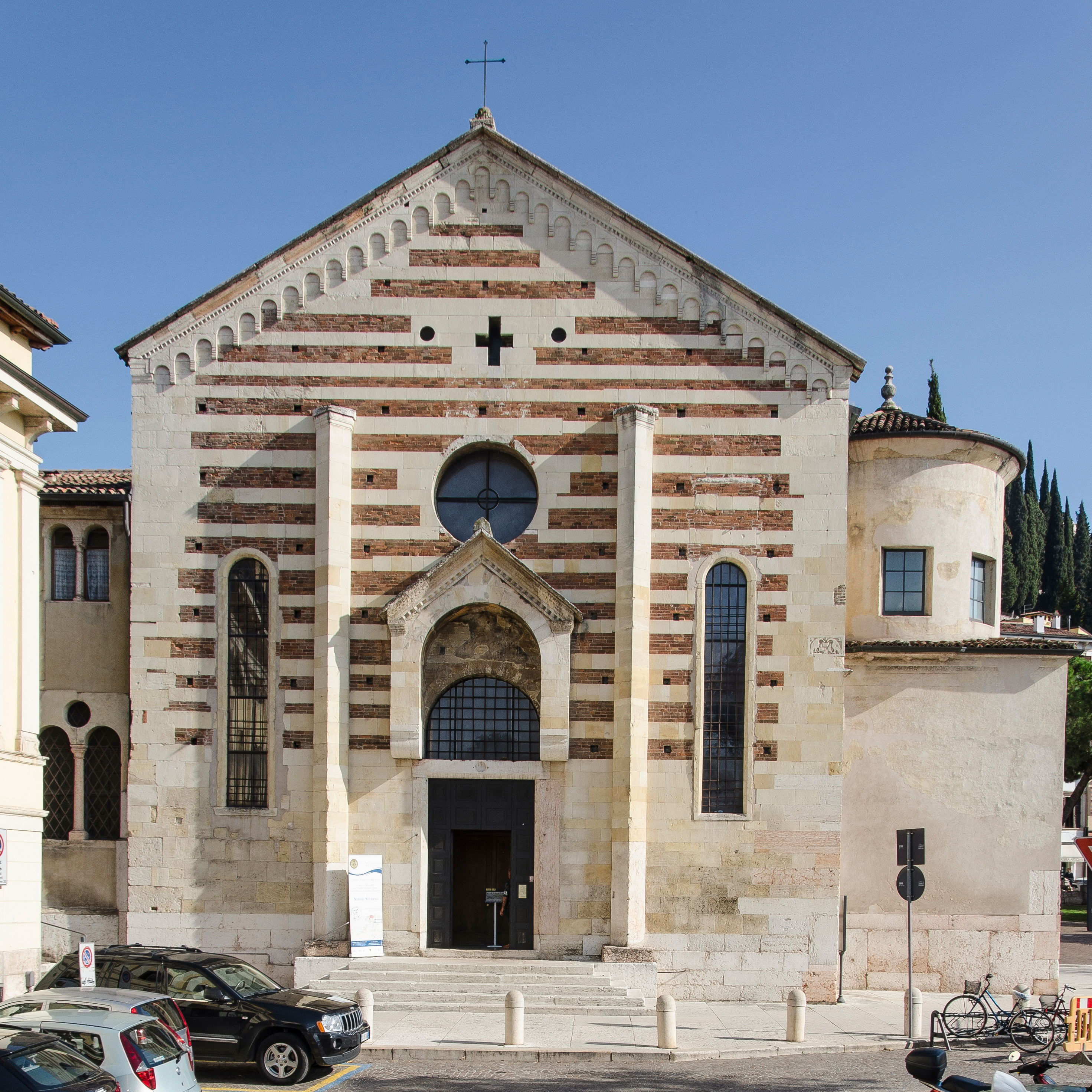 Fotografia della facciata